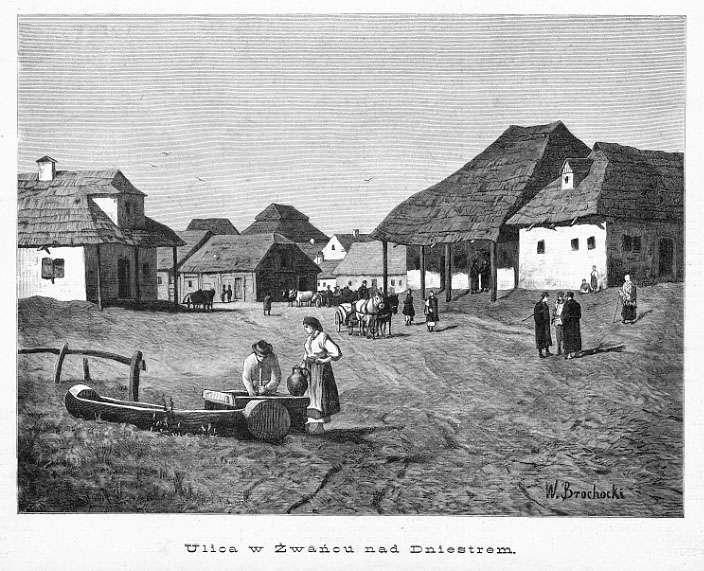 Жванец в конце XX века, видна синагога на заднем плане.